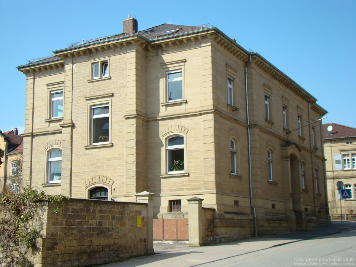 Historisches Gebäude Kaiserstr. 1 in Eppingen